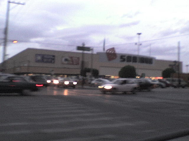 Soriana Colón Store, opened aprox. 1969.